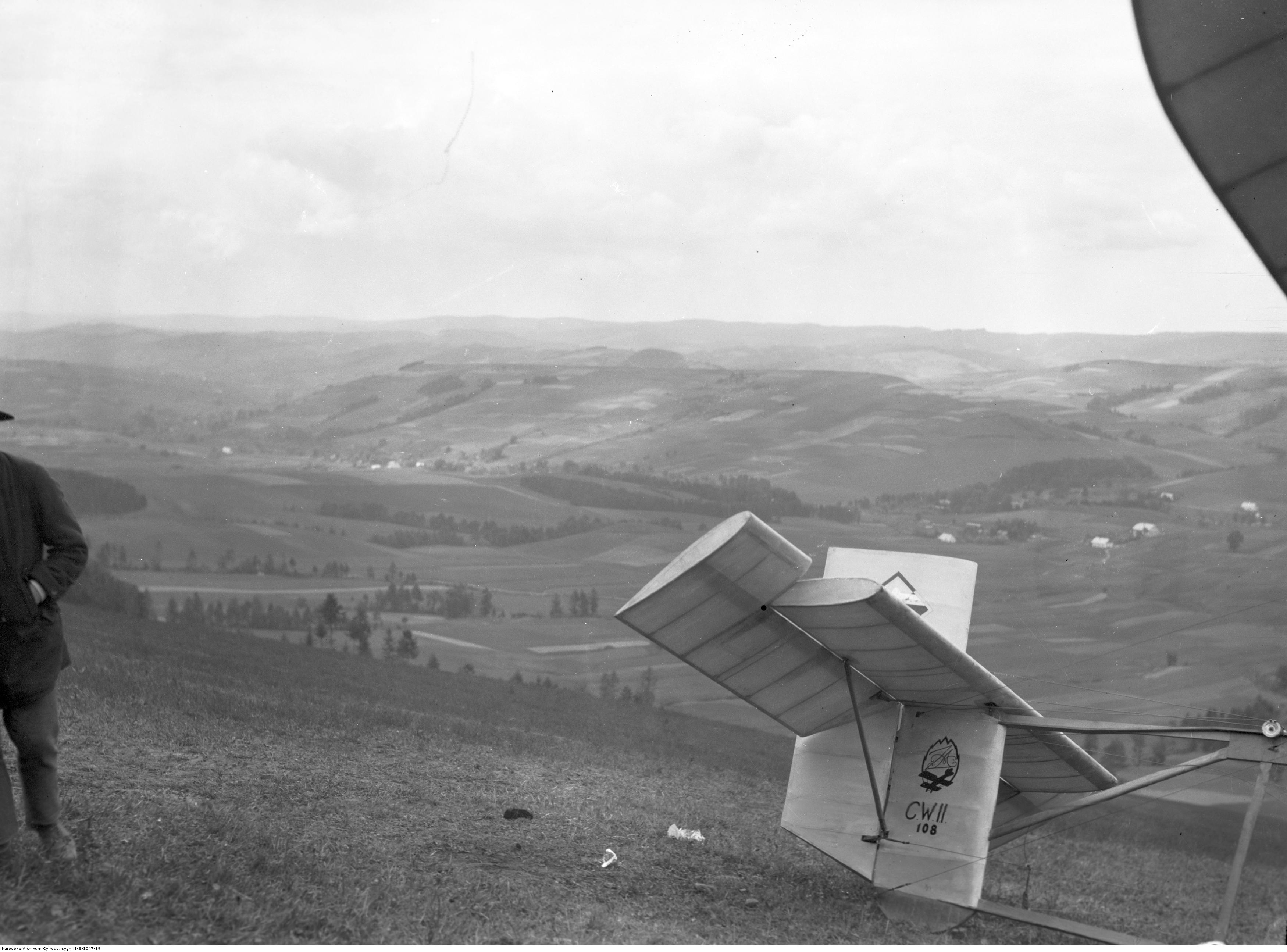 Statecznik szybowca CW-II. Szkoła szybowcowa w Bezmiechowej